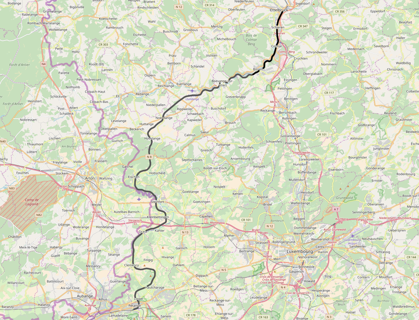 CFL line 2, Pétange - Ettelbruck